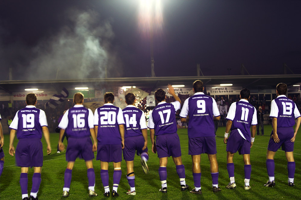 Mannschaft der neugegründeten Austria Salzburg bei einem Auswärtsspiel in Seekirchen